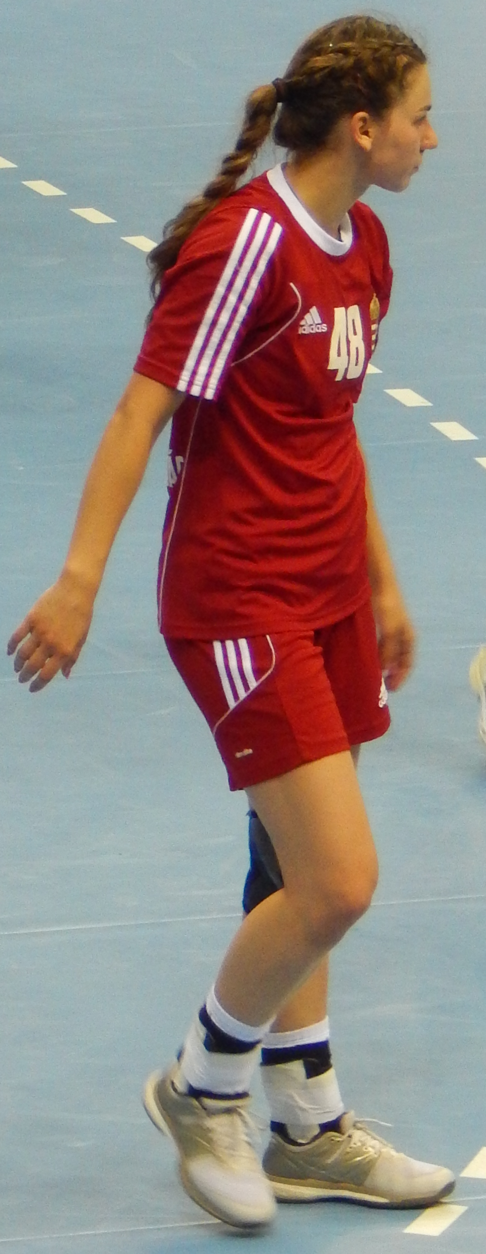 Чемпионат мира по гандболу среди девушек до 20 лет. Групповой этап, группа A. Матч Венгрия - Норвегия